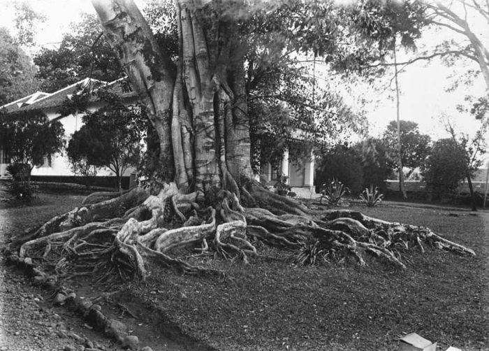 Foto. Toempang, Oost-Java, waringinboom